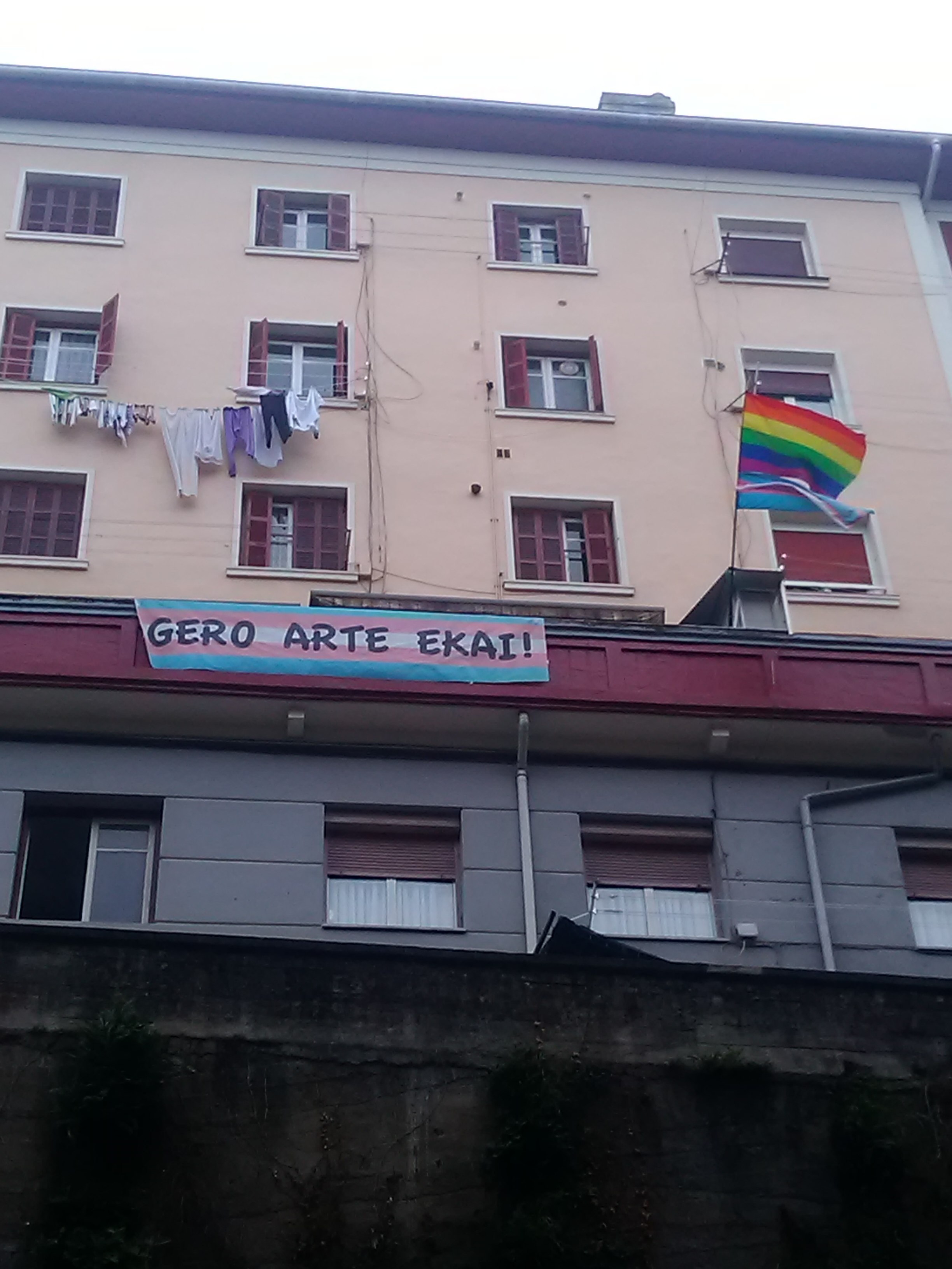 Banderas trans y LGTBIQ+ en Ondarroa, recordando a Ekai Lersundi.